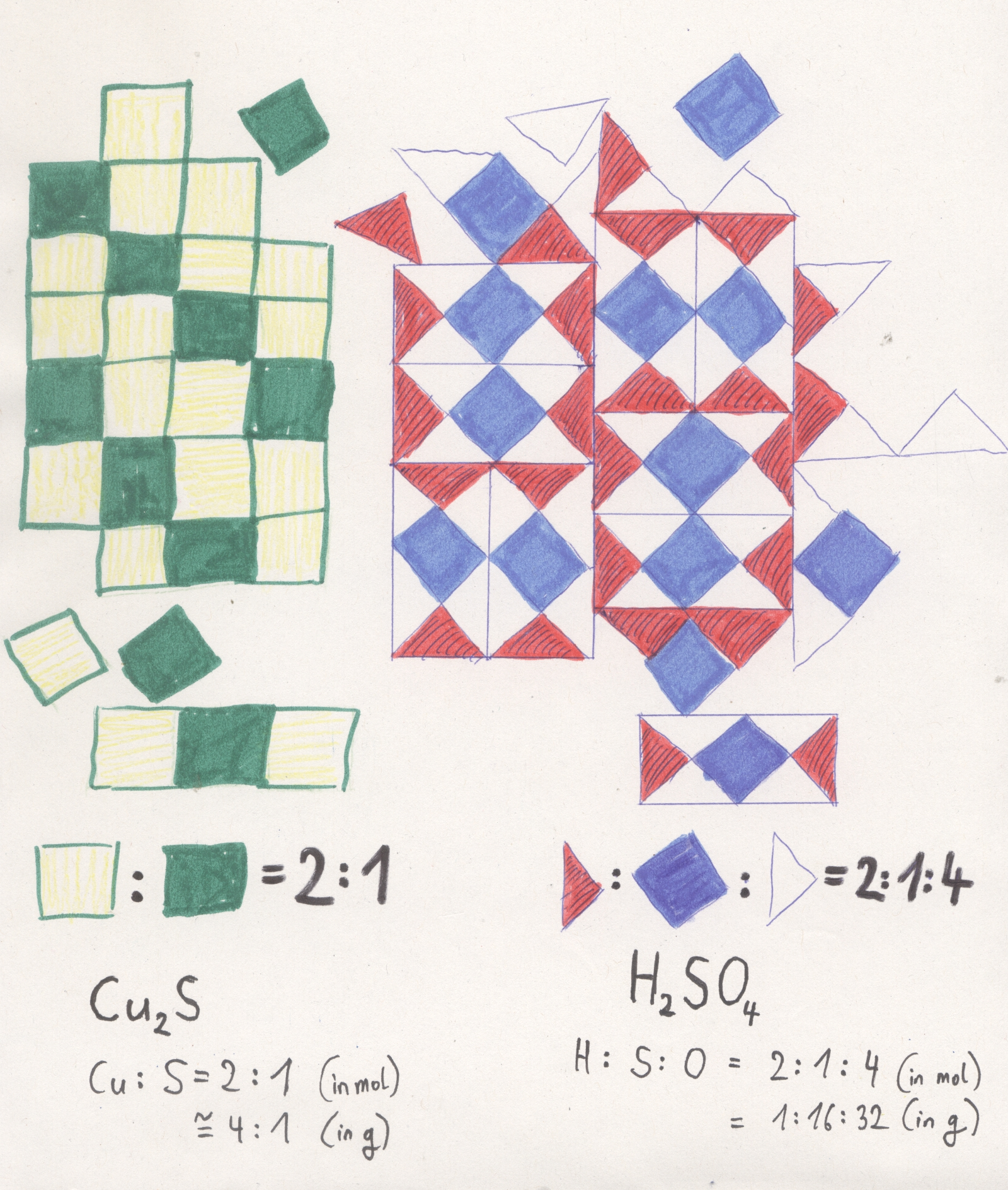 Veranschaulichung zum Gesetz der konstanten Proportionen